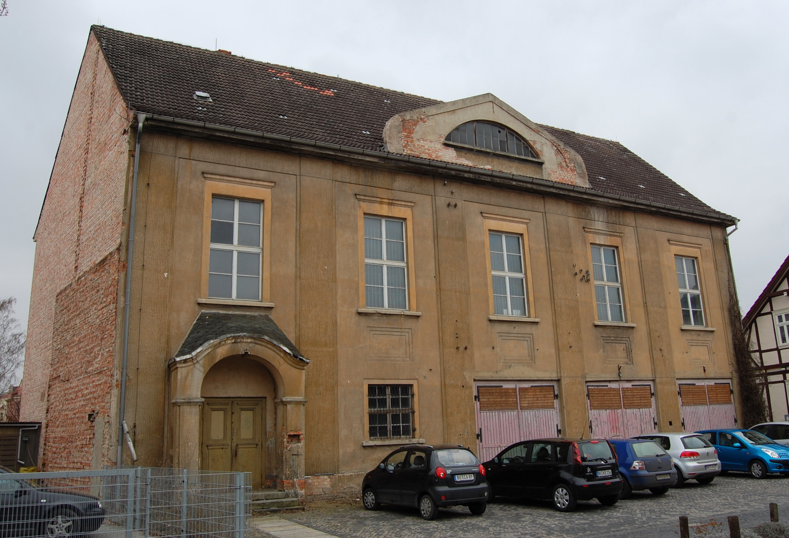 Turnhalle Petersilienstraße 1 in Oschersleben